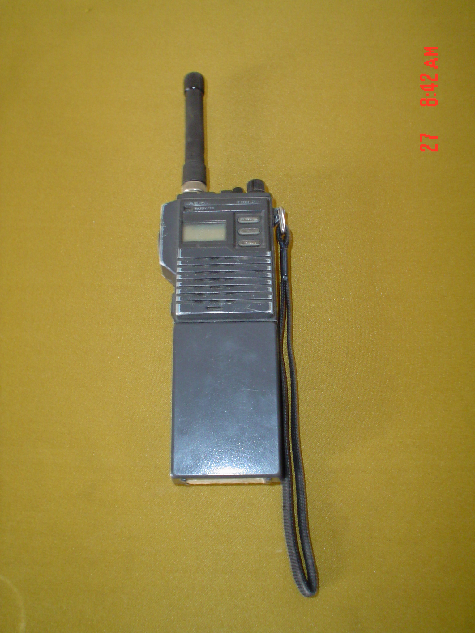 Radiotelefono